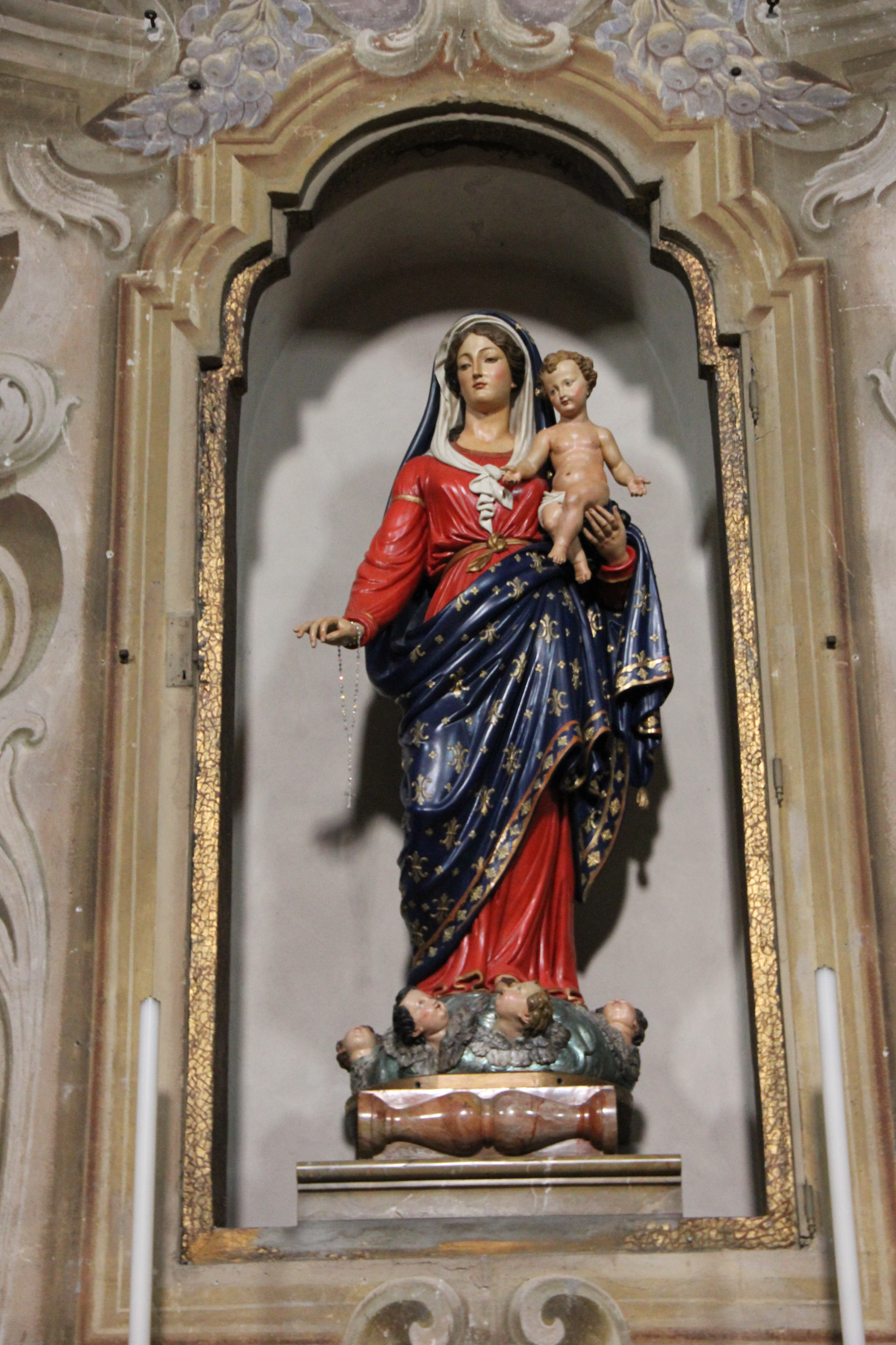 Plebana di Uggiate